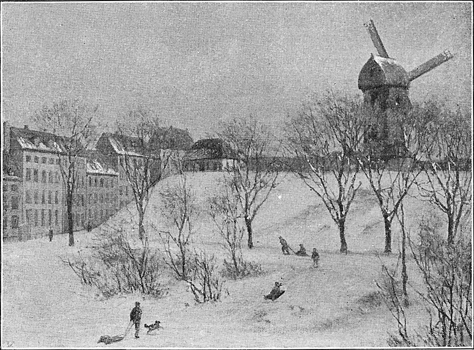 Volden ved det gamle Halmtorv (nuværende Rådhuspladsen) med Lucie Mølle (også kaldet Lusse-møllen).